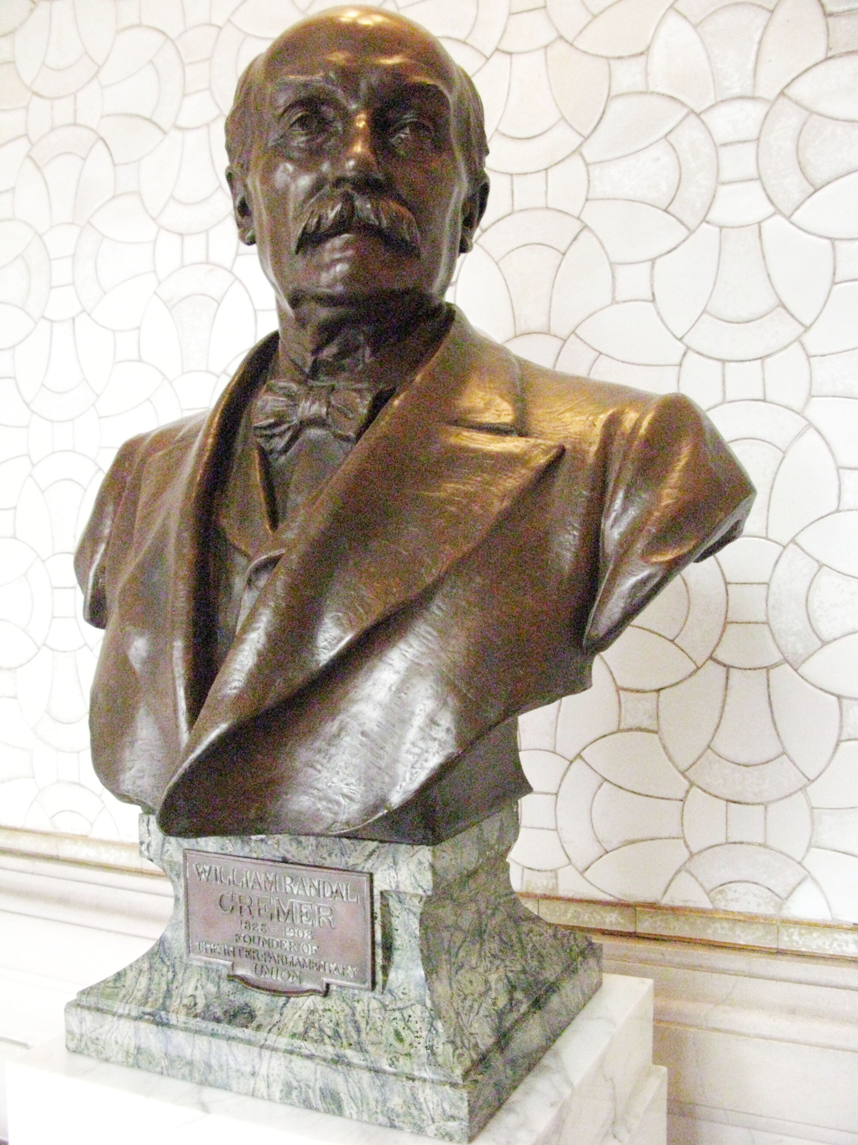 Buste de William Randal Cremer a se trouvant dans le Palais de la Paix Peace Palace Den Haag The Hague La Haye